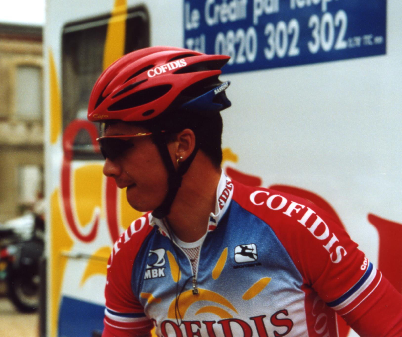 TOUR DE L'AVENIR 2001